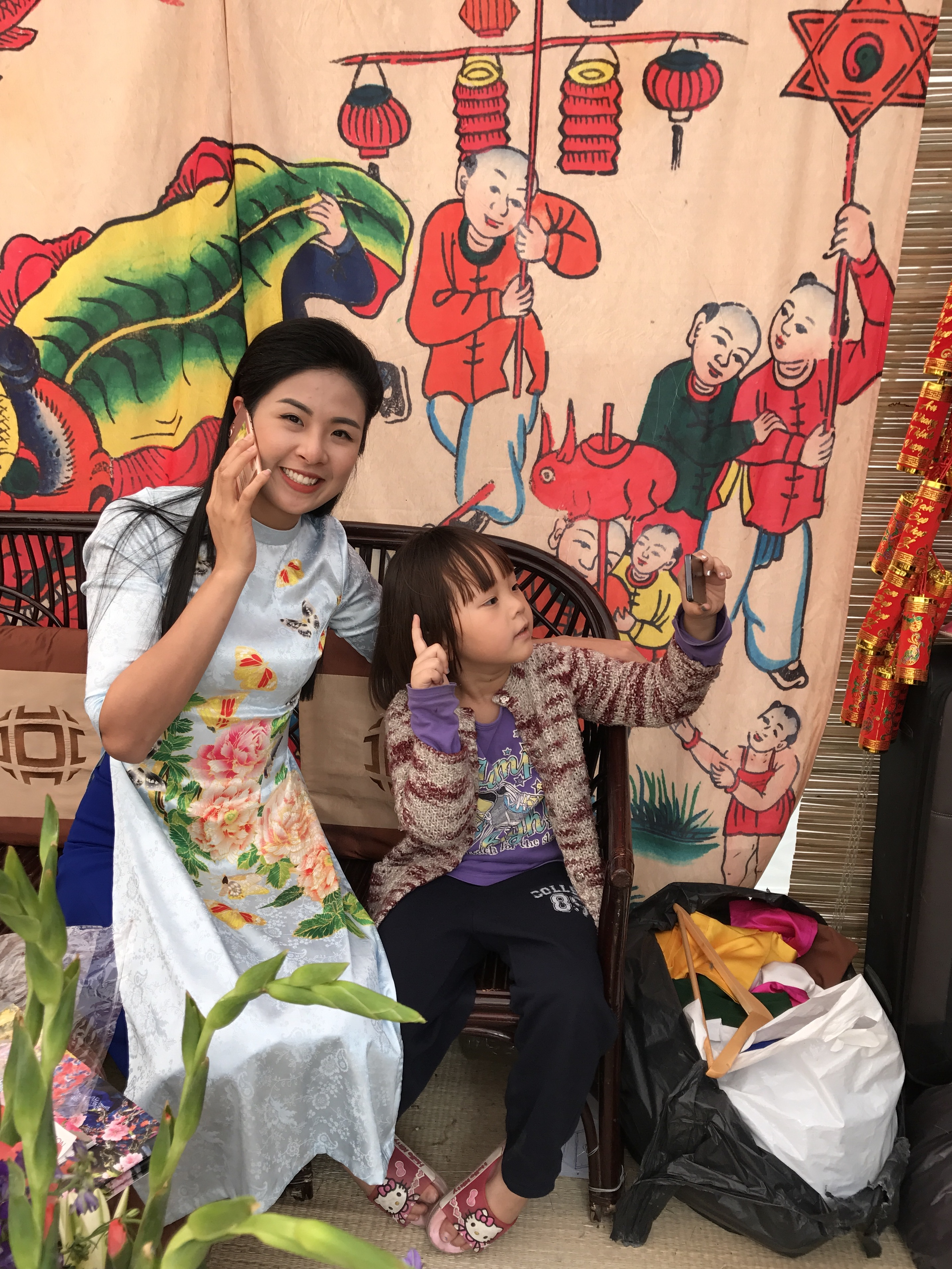 Hoa hậu Đặng Thị Ngọc Hân và Trương Hoàng Khánh Ngọc tại hội chợ xuân Vinhomes Times City 1017